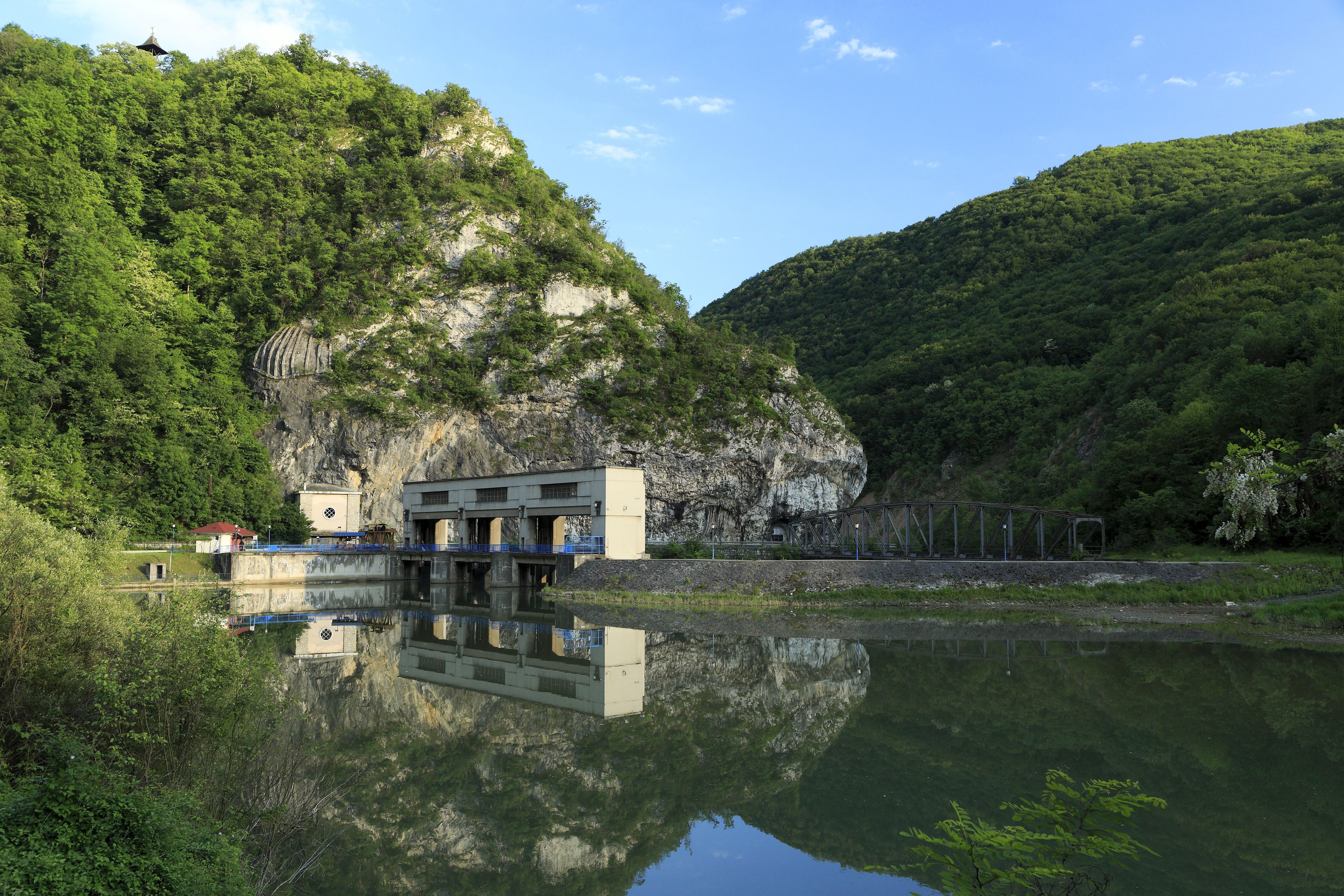 Dahinter ein weiterer Brückenüberbau der alten Eisenbahnstrecke Požega–Čačak